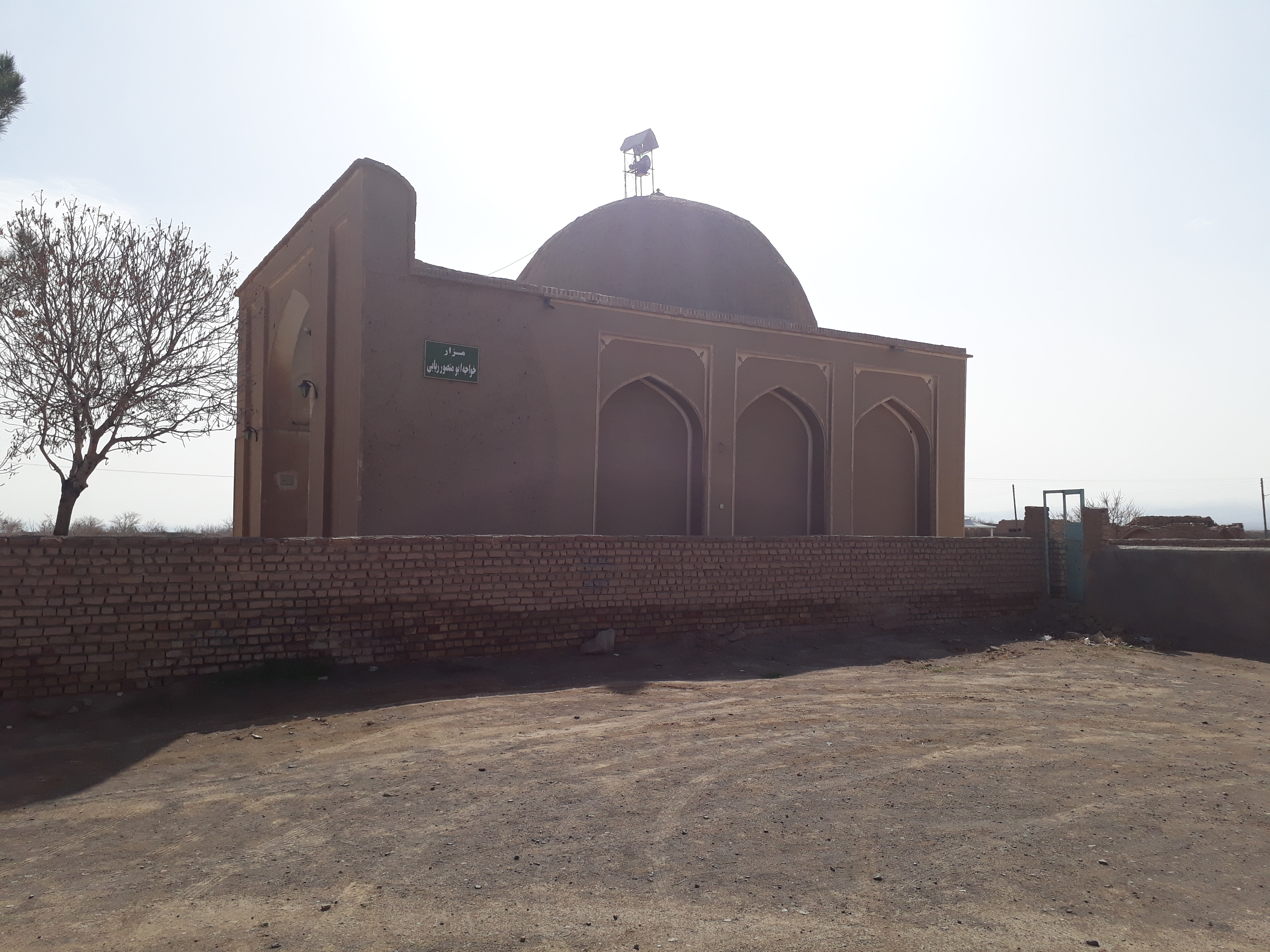 مقبره مربوط به سده ششم هجری قمری (دوره سلجوقی) است